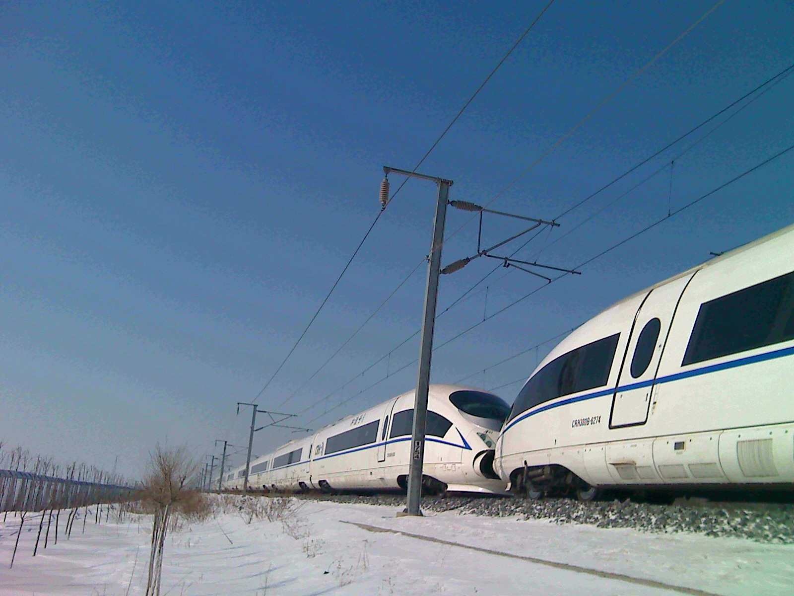 重连运用于长吉城际铁路上的中国铁路CRH380B型动车组